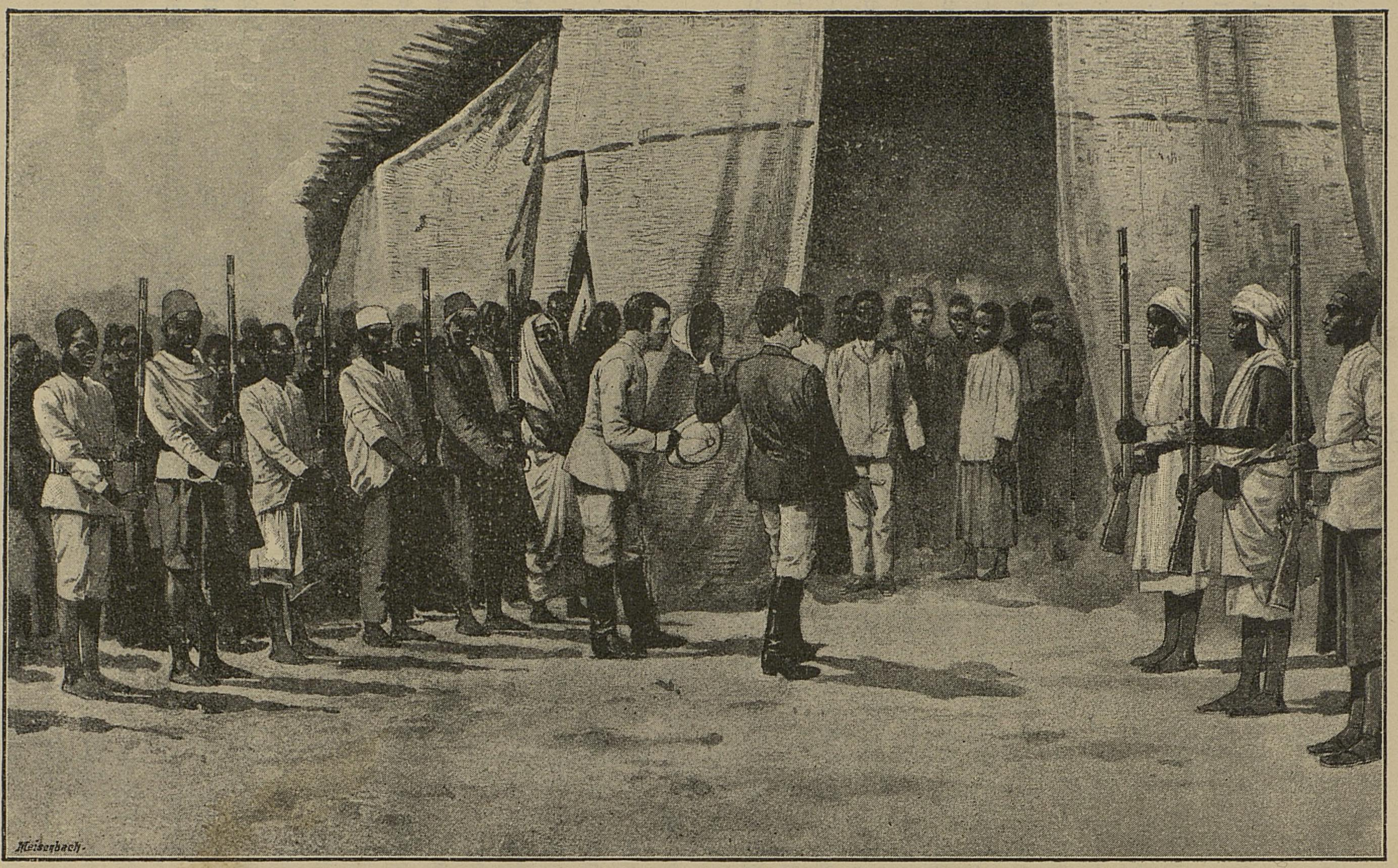 Illustrasjon hentet fra boken "Den tyske Emin Pascha-Expedition" av Peters, Carl og utgitt av Forlagsbureauet (Kjøbenhavn, 1891)